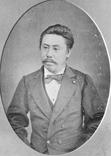 Heinai Orita